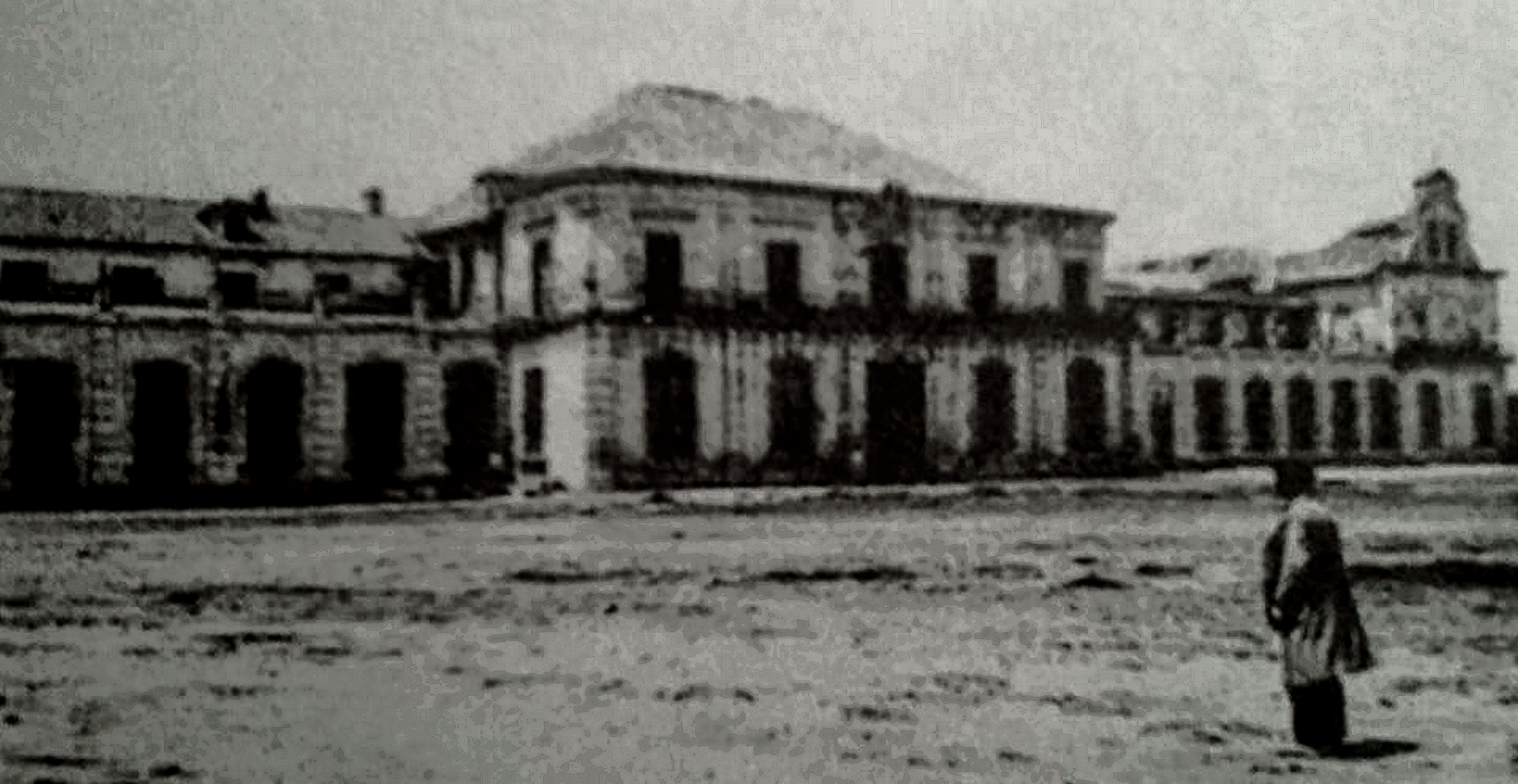 Fotografía tomada por anónimo desde la actual plaza de España, de la fachada principal de la Antigua Fábrica de Tapices de San Fernando en fecha no concretada del año 1928.